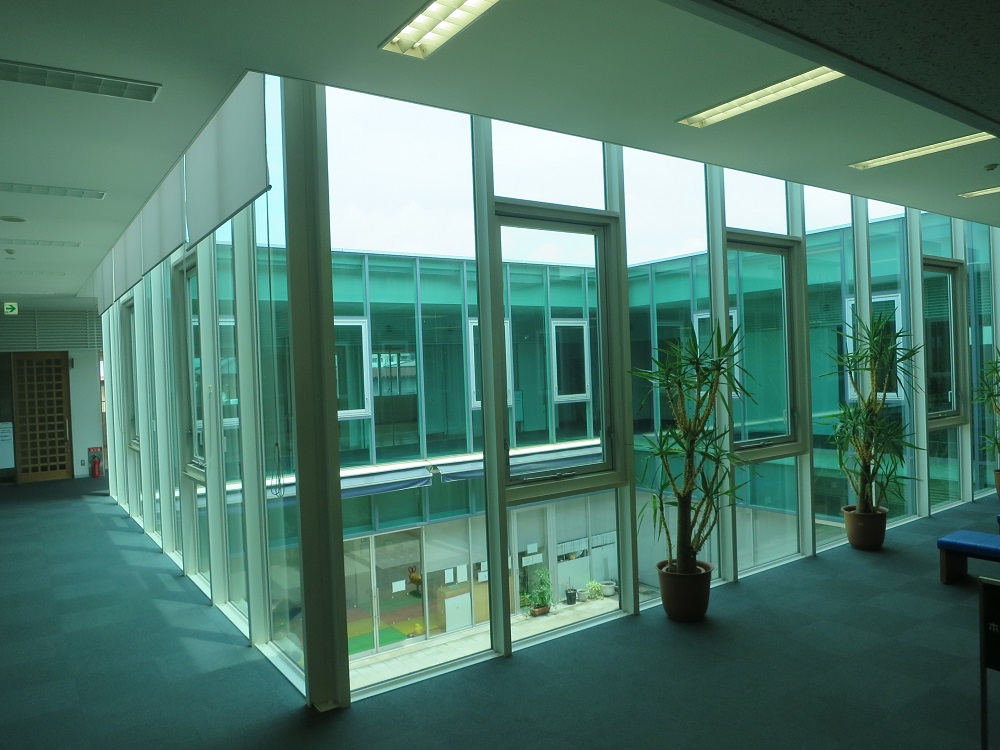 岡崎市西部地域交流センター・やはぎかんの2階